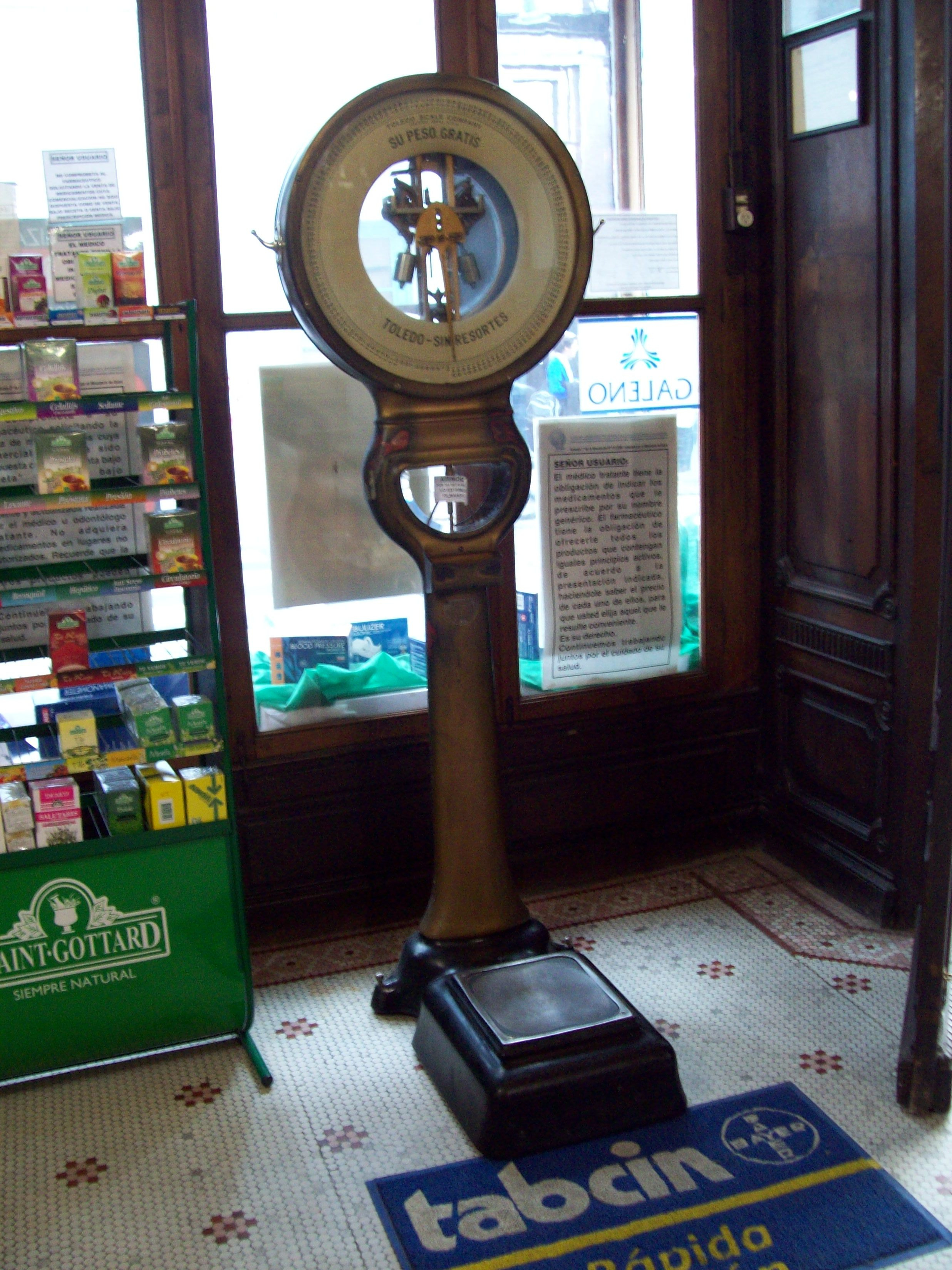 Báscula de la farmacia más antigua de Buenos Aires.